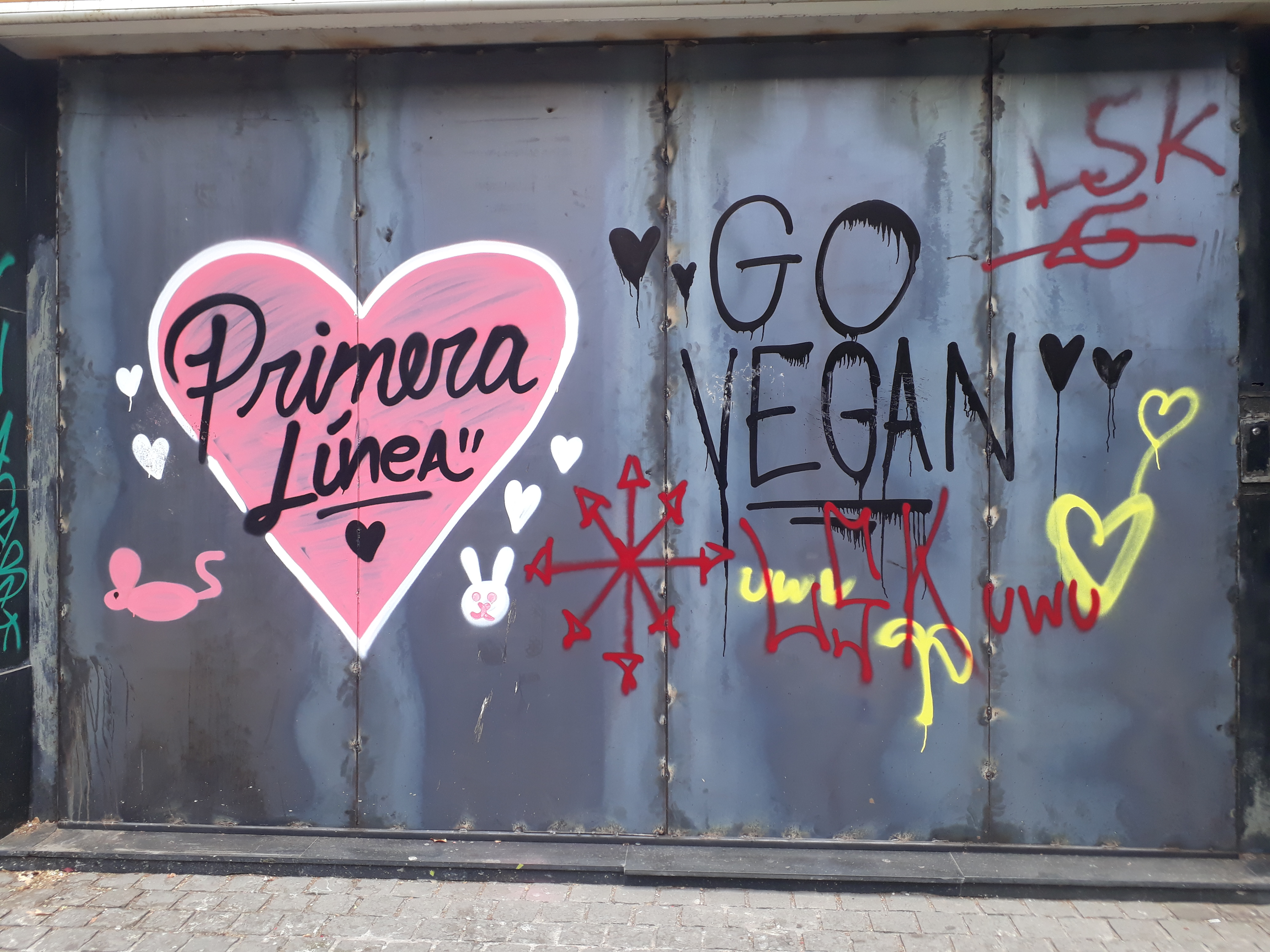 Rayados fuera de una tienda comercial durante las manifestaciones en Santiago de Chile.